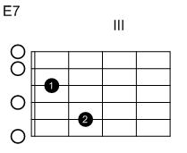 Eigenanfertigung